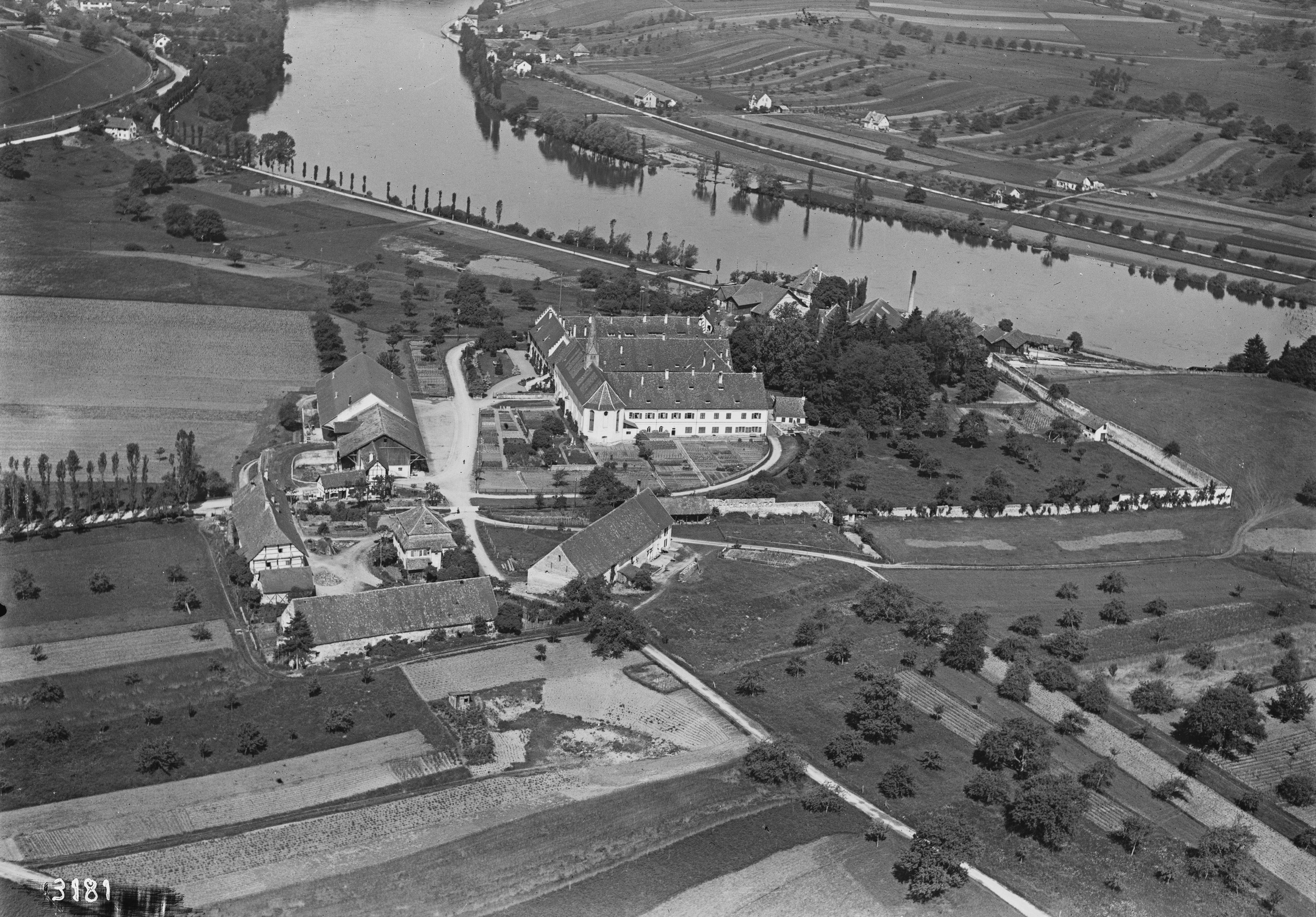 Flugaufnahme, Klostergut Paradies, Schlatt, Thurgau, 1922